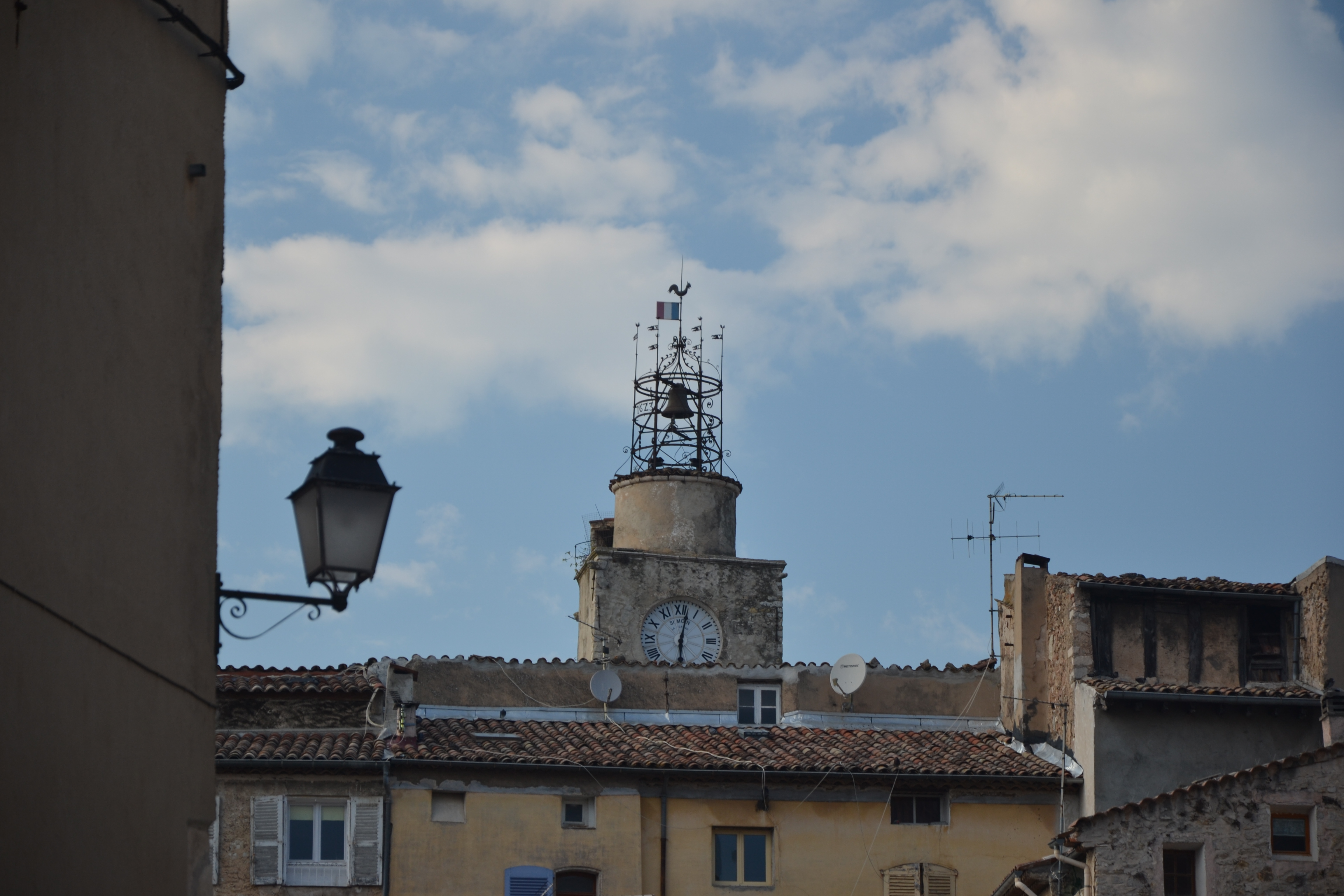 Campanile de la tour de l'horloge de Lorgues